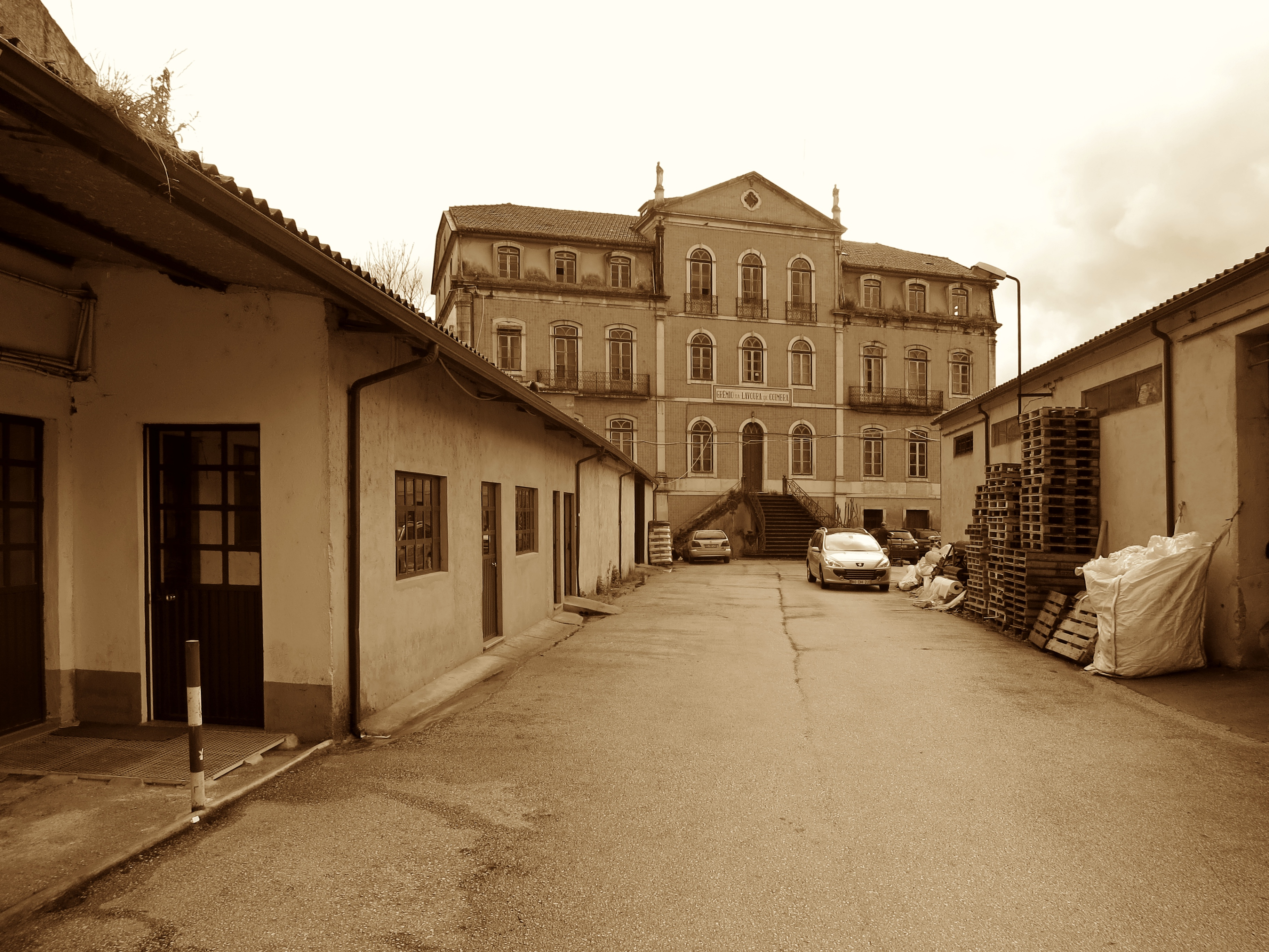 Coimbra - Antigo Grémio da Lavoura de Coimbra.